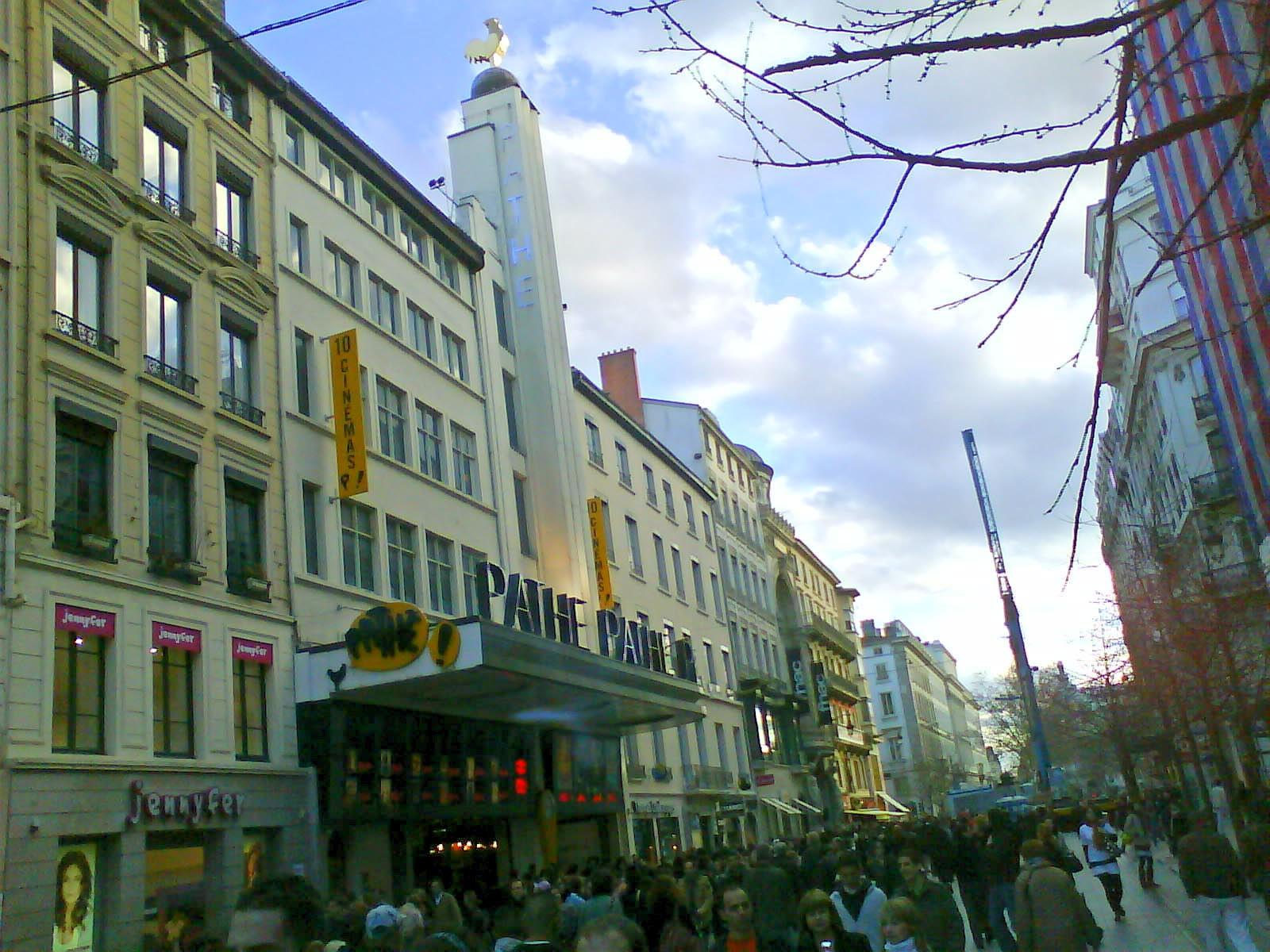 Rue de la république Lyon, immeuble du cinéma pathé Lyon, avec son beffroi et le coq sur le toit.